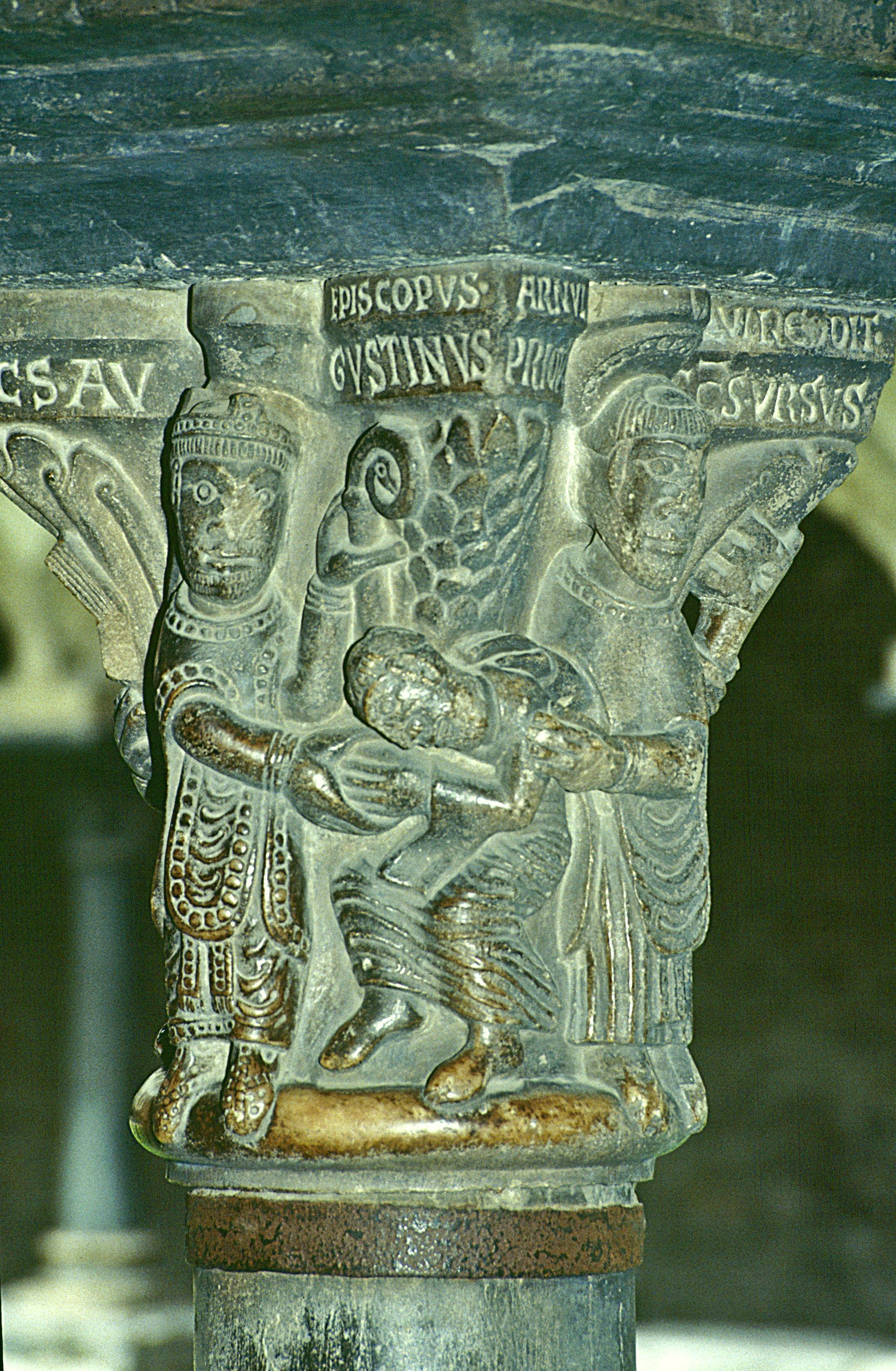 Aosta: Kreuzgang des Collegiata dei Santi Pietro e Orso